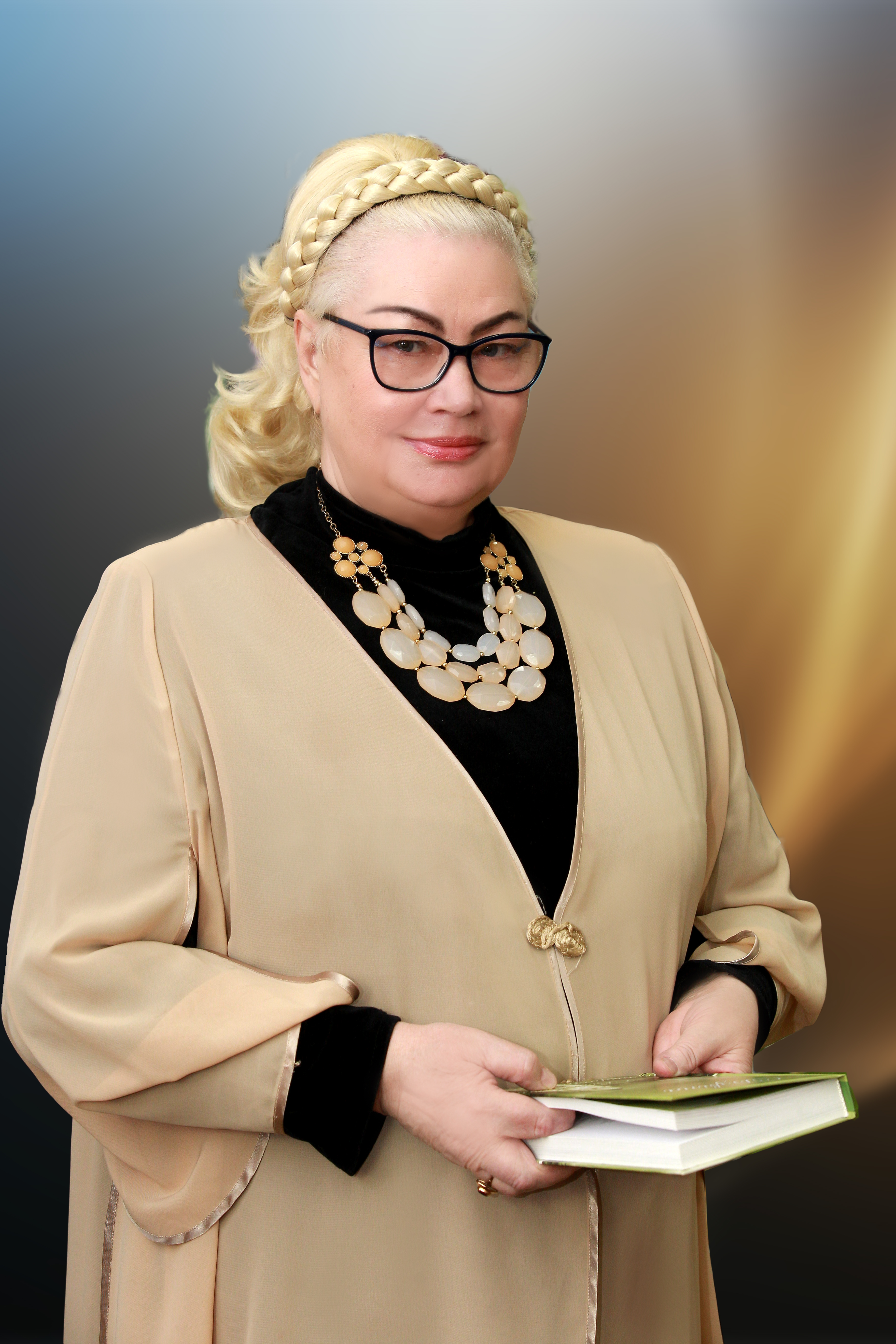 Тамара Краснова-Гусаченко, поэт, член Союза писателей Беларуси,председатель Витебского областного отделения ОО "СПБ"